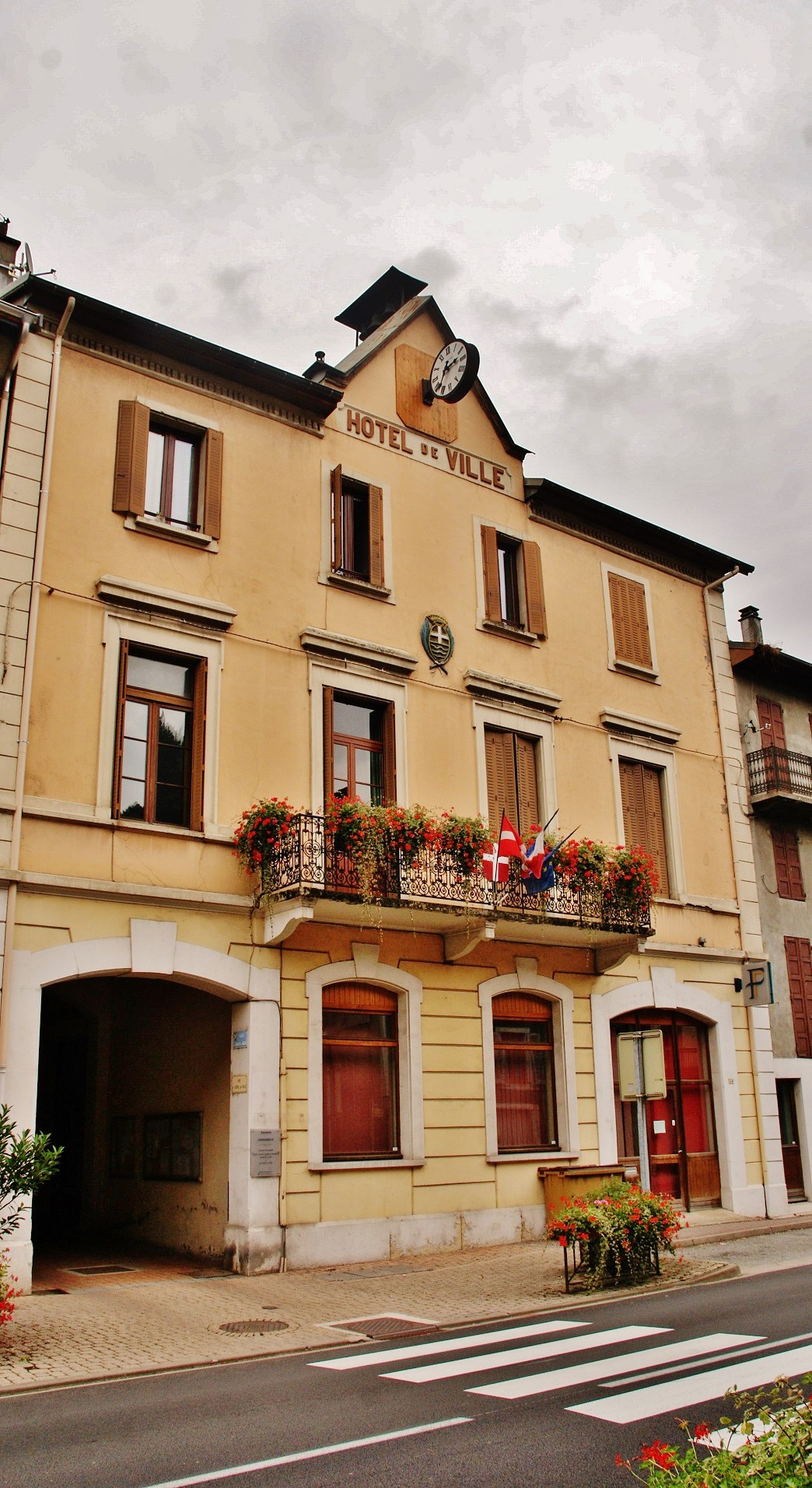 Hotel-de-Ville